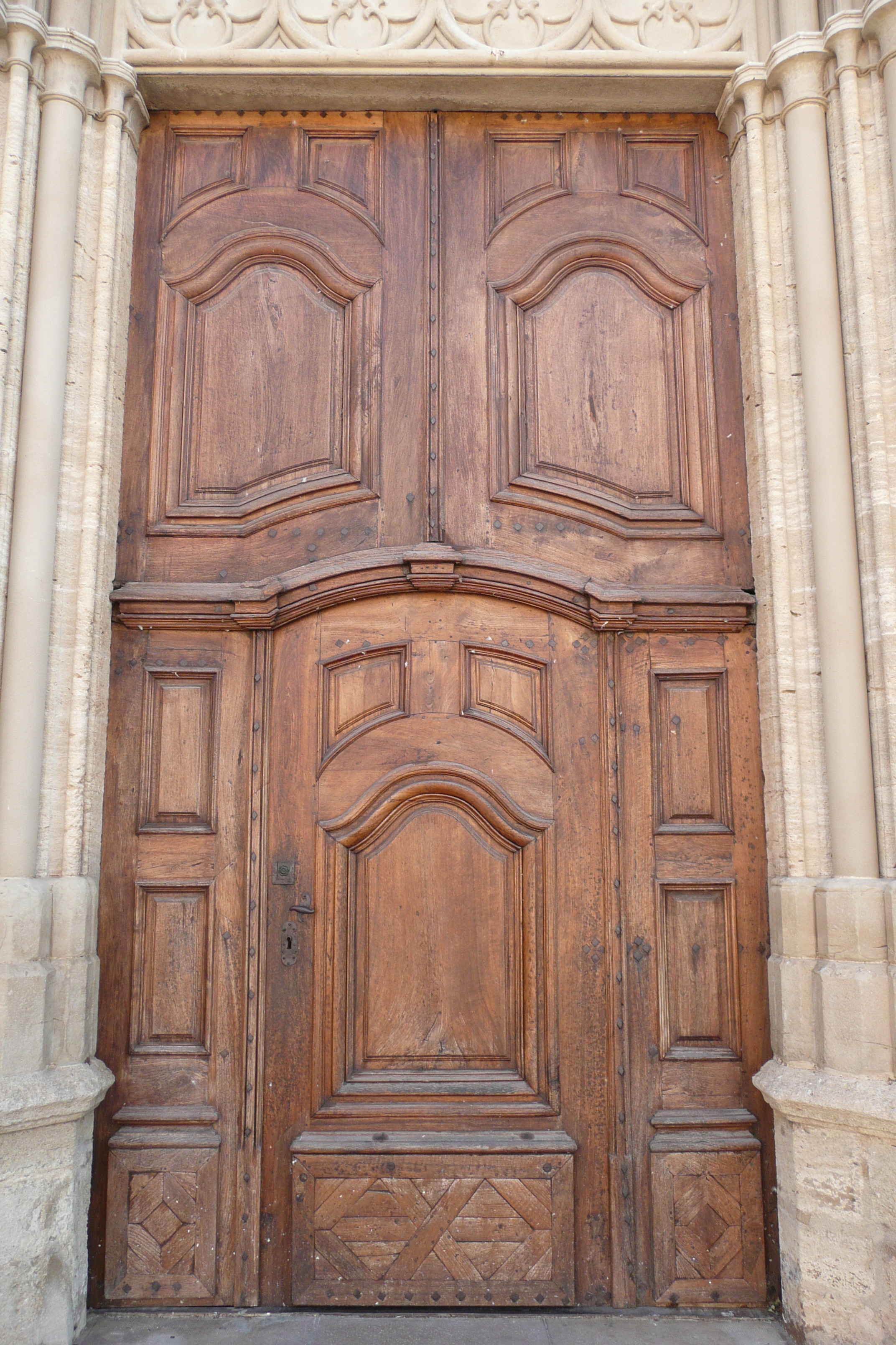 Porte de l'église Notre-Dame-de-Beaulieu de Cucuron (Vaucluse, France).